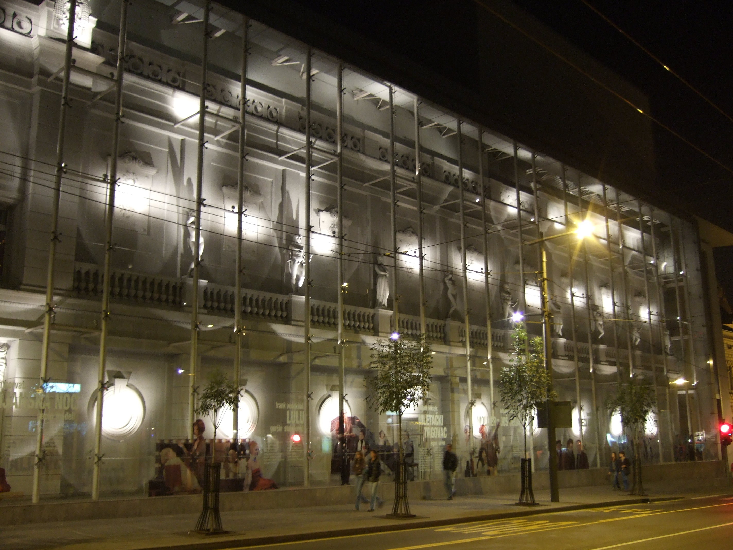 Jugoslovensko Dramsko Pozorište, Beograd. Noć